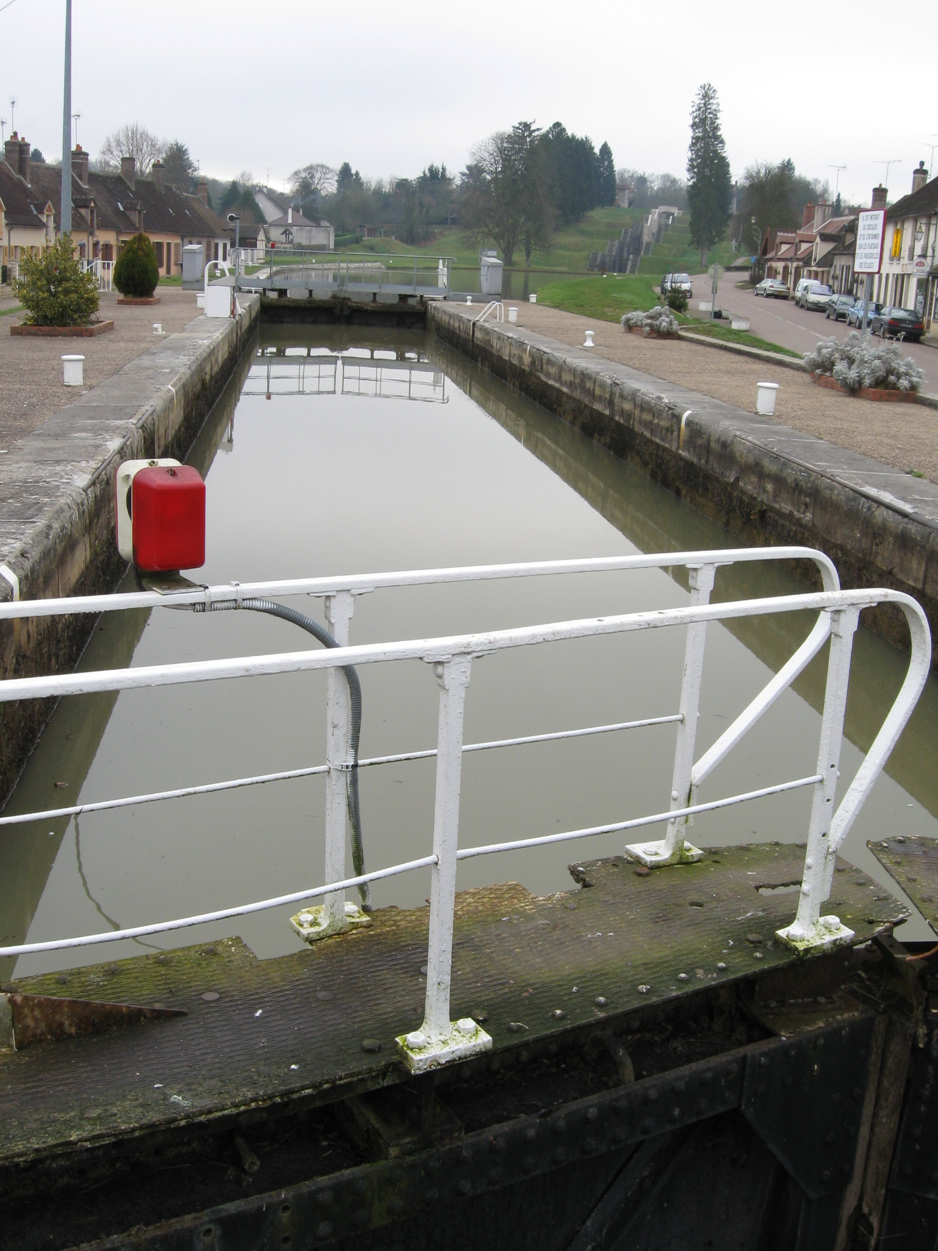 Rogny-les-Sept-Écluses ; écluse du canal de Briare. En arrière-plan, l'escalier d'écluses. Vue vers le sud-ouest.